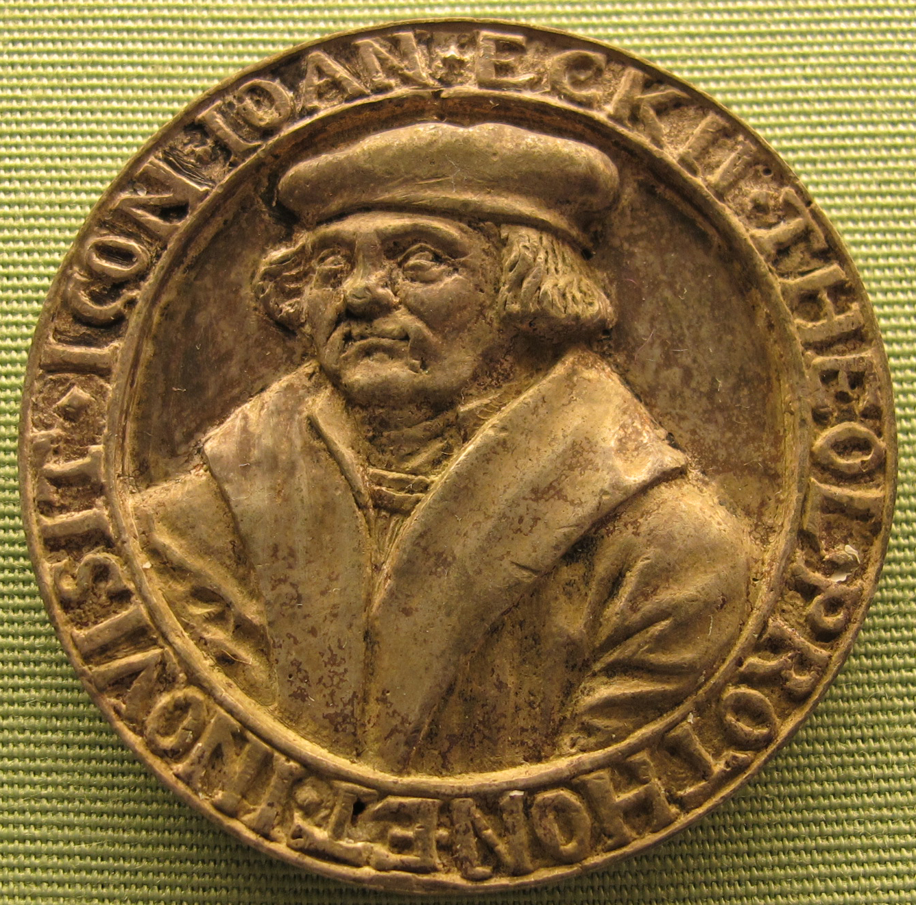 Ignoto, johannes eck, 1529